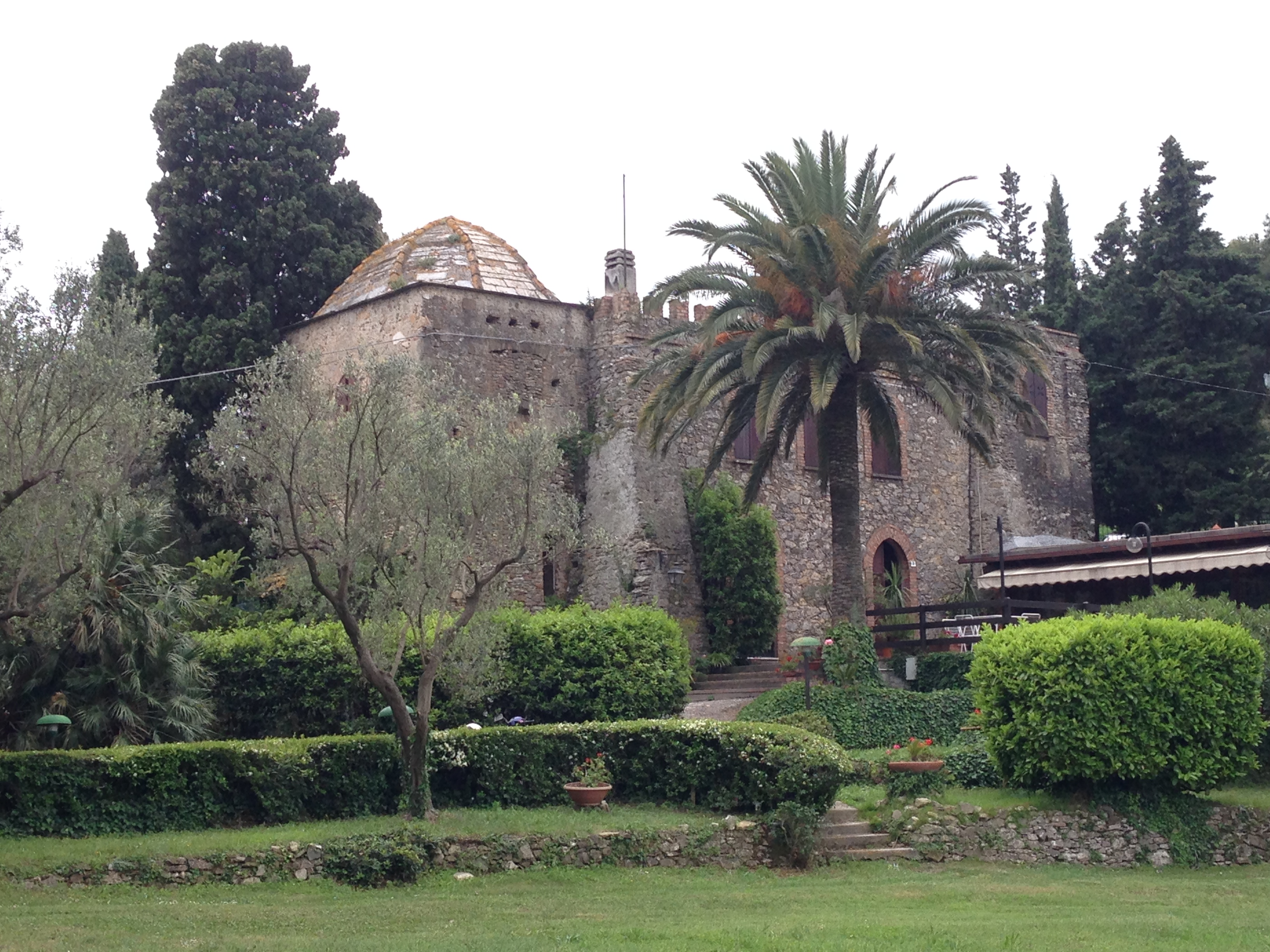 L'ex-chiesa di san Martino al Monte, di proprietà storica dei frati dell'Isola Gallinara sulla terra ferma, diventa nel corso del XX secolo prima proprietà privata e poi ristorante